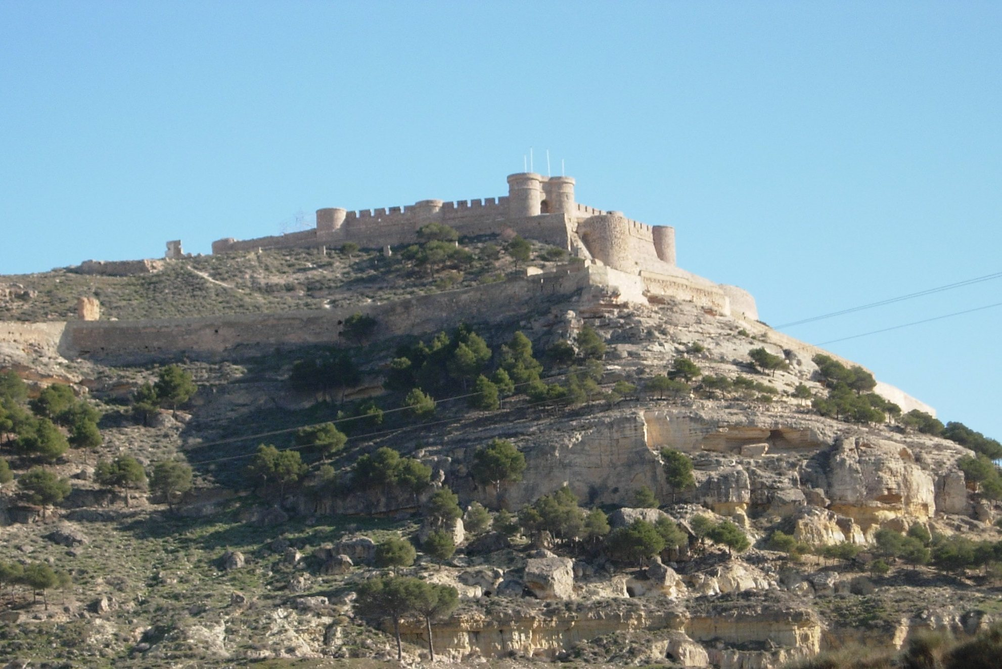 Fotogafía del castillo de Chinchilla de Montearagón